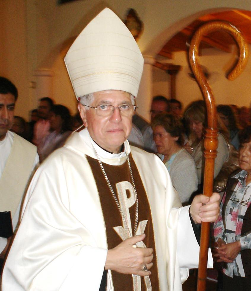 Arzobispo de San Juan de Cuyo